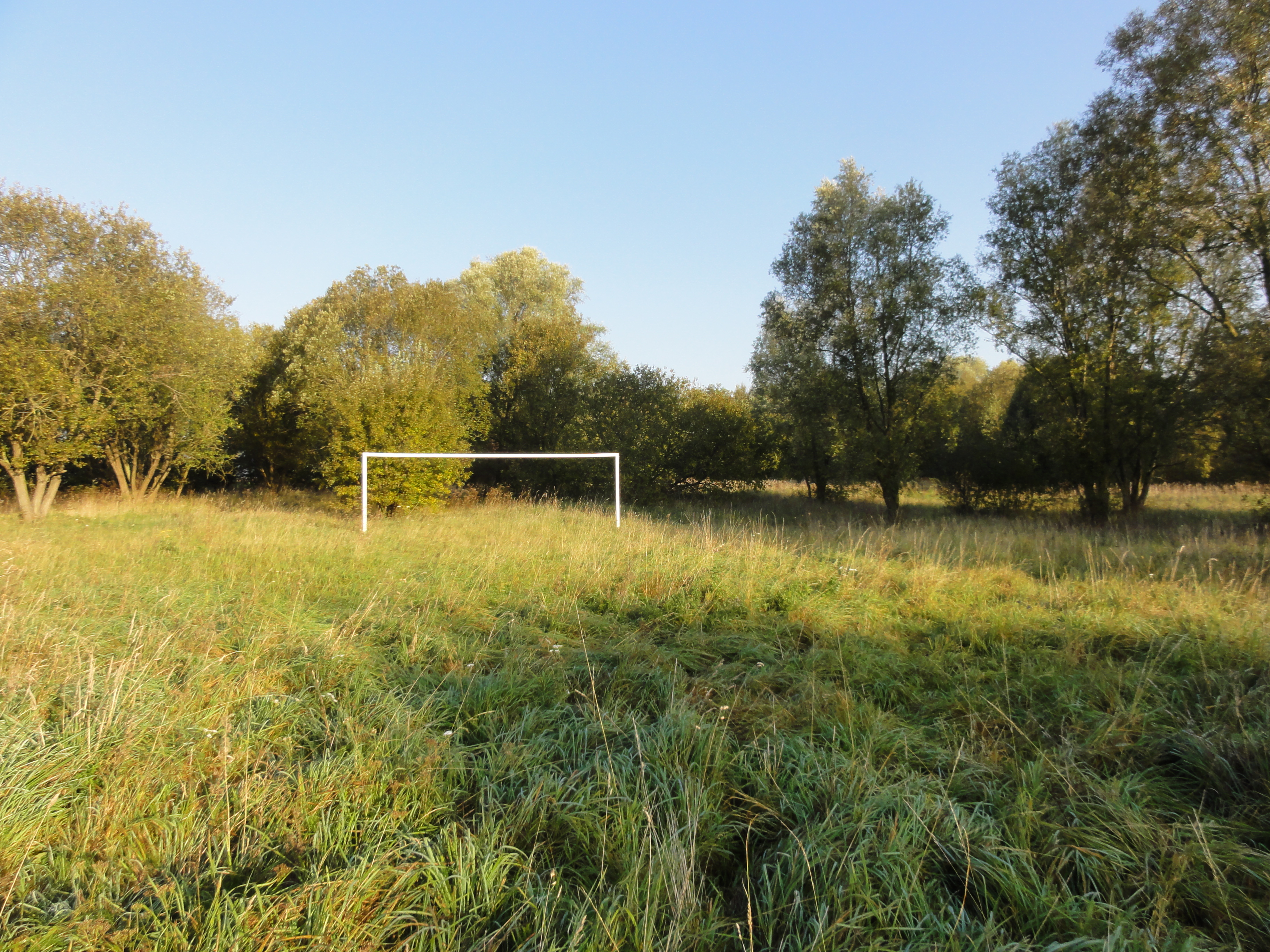 Terril n° 111A dit 14 de Carvin Nord, disparu, Fosse n° 4 de la Compagnie des mines de Carvin, Carvin, Pas-de-Calais, Nord-Pas-de-Calais, France.